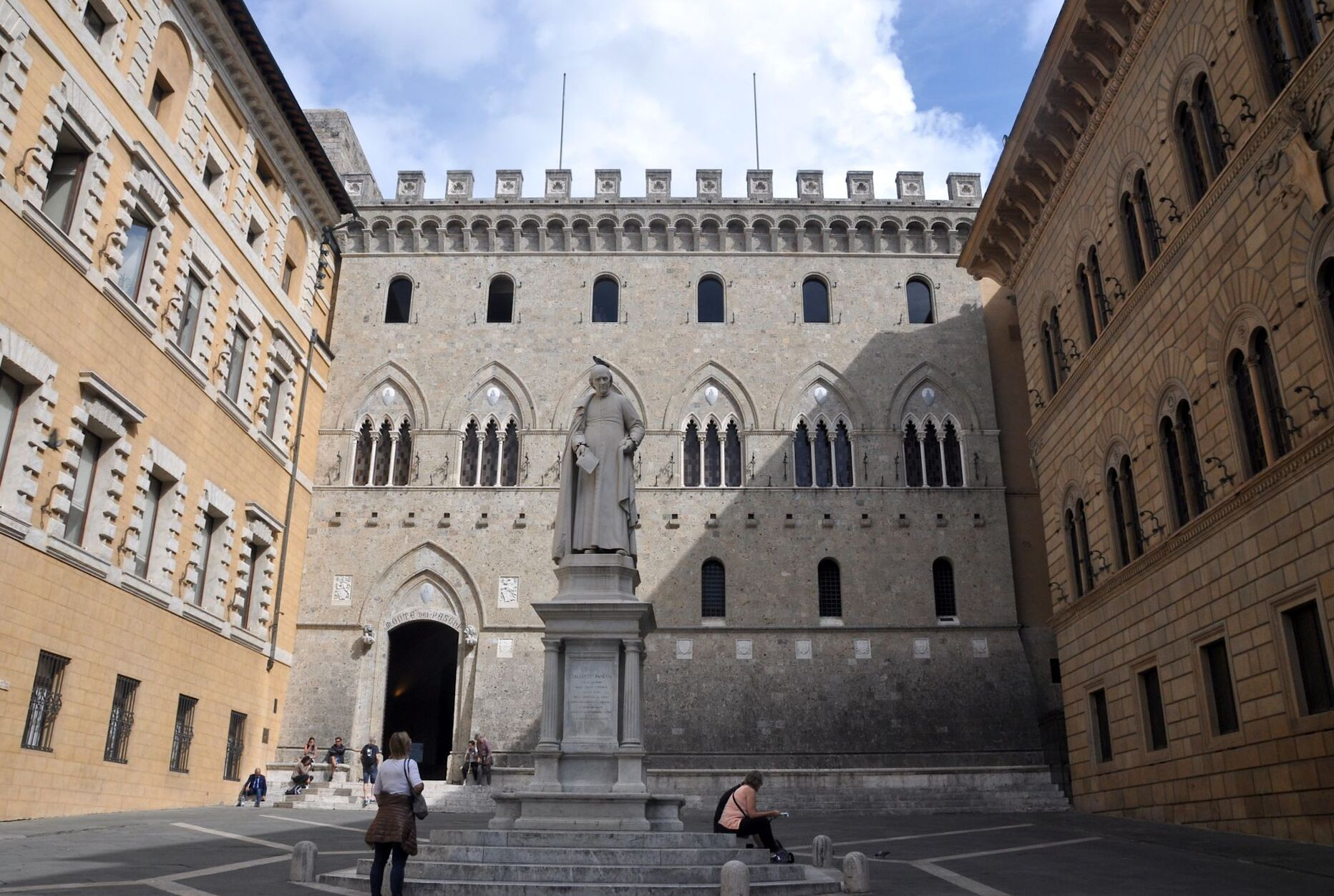 Siena, Piazza Salimbeni (Bank Monte dei Paschi di Siena)